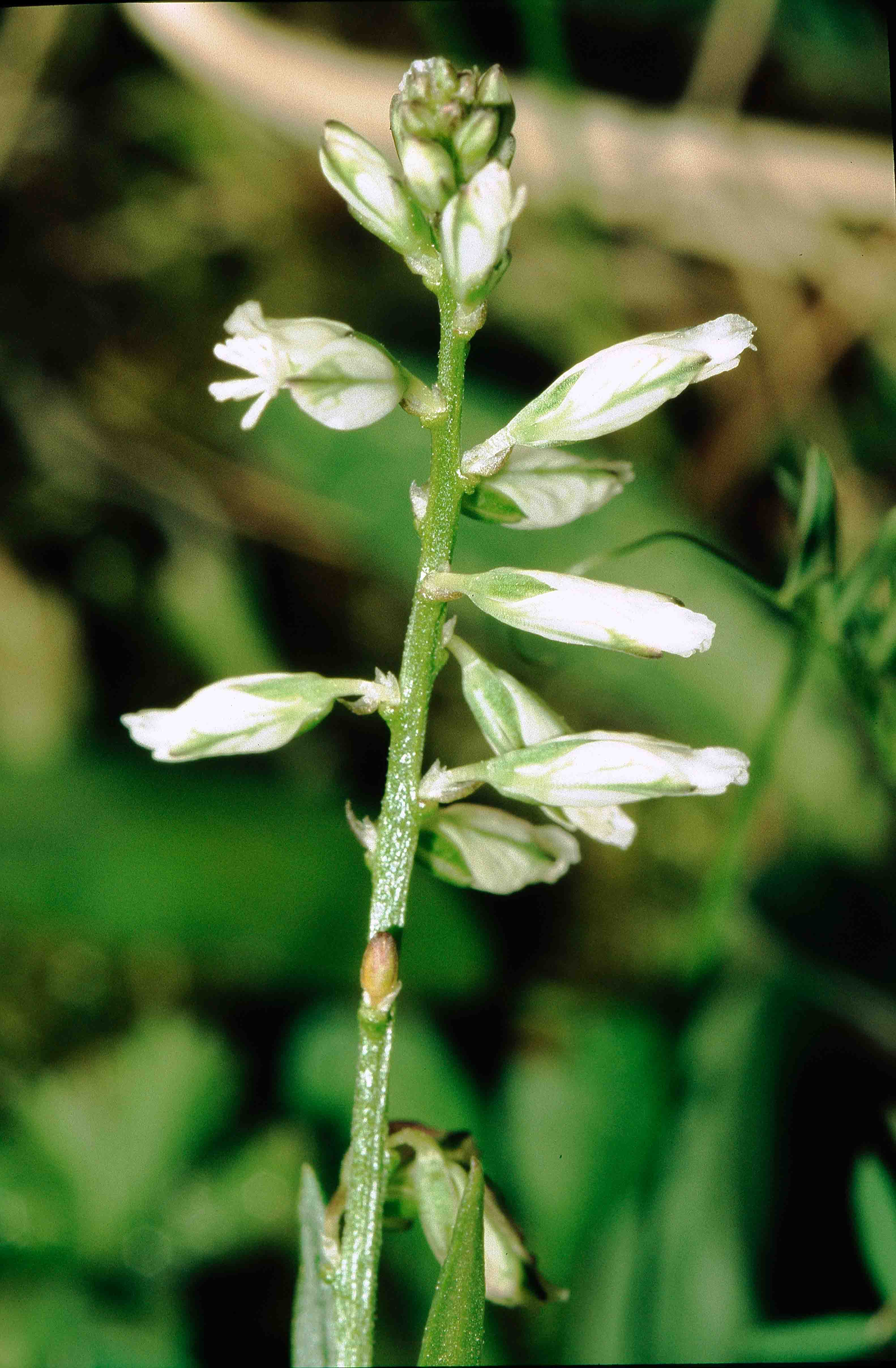 Polygala vulgaris ssp. oxyptera (Unterfranken, Germany)